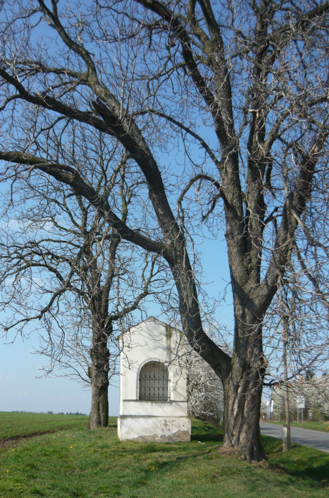 Hradenín, kaplička na okraji obce.